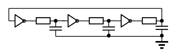 Фиг. 4 ring oscillator